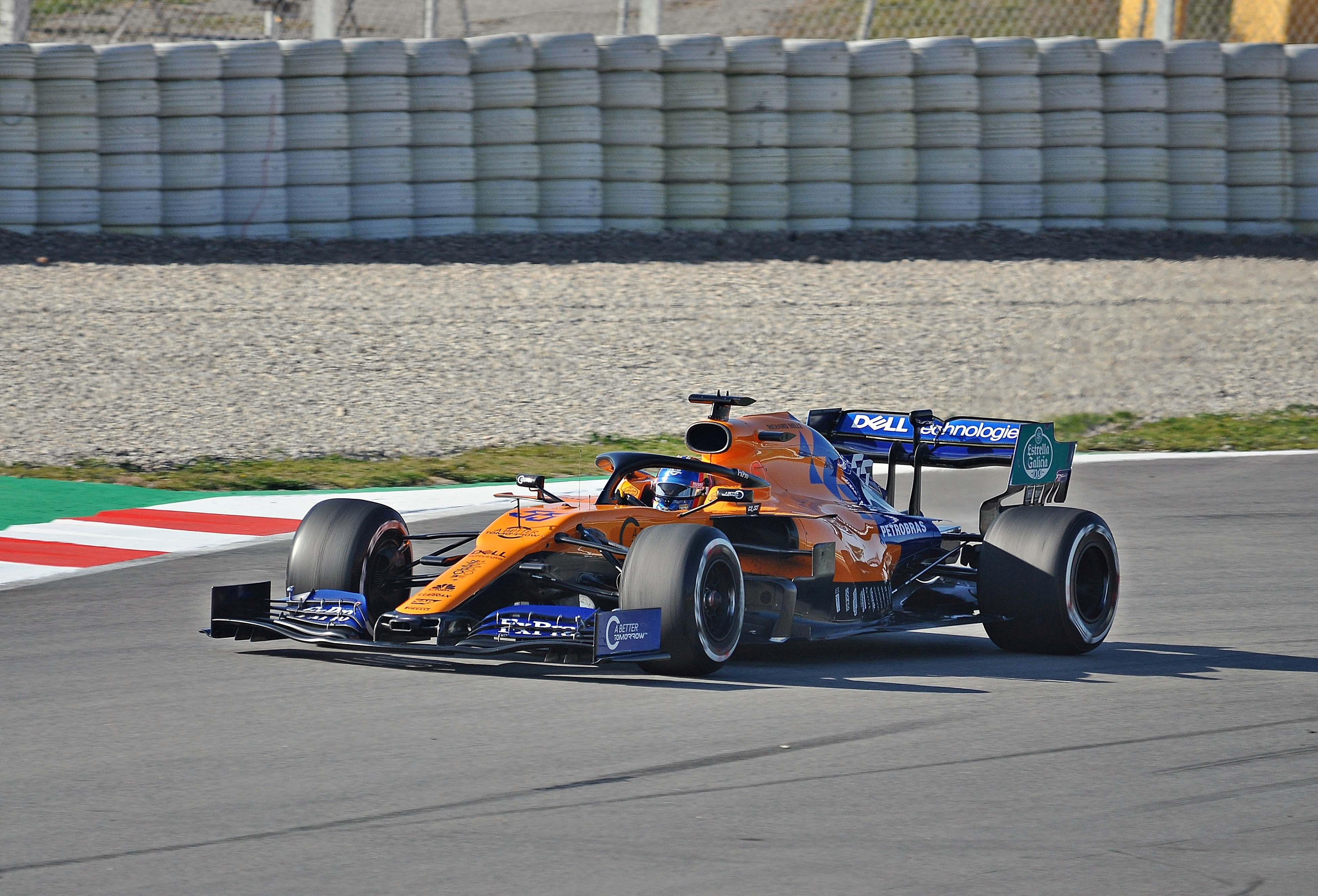 Test Days-Circuito de Catalunya